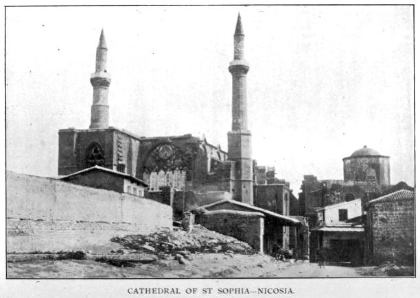 Nicosia, Cyprus